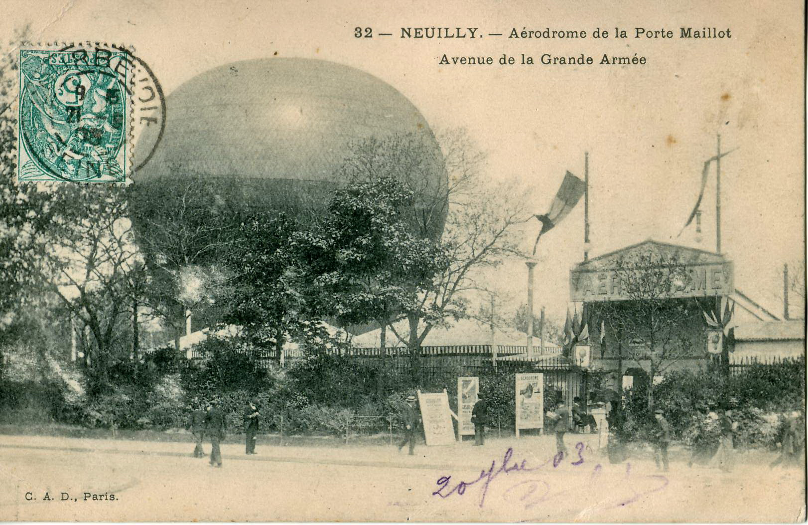 Carte postale ancienne éditée par CAD, N°32NEUILLY (Hauts-de-Seine - France) : Aérodrome de la porte Maillot - Avenue de la Grande ArméeGros plan sur un ballon captif